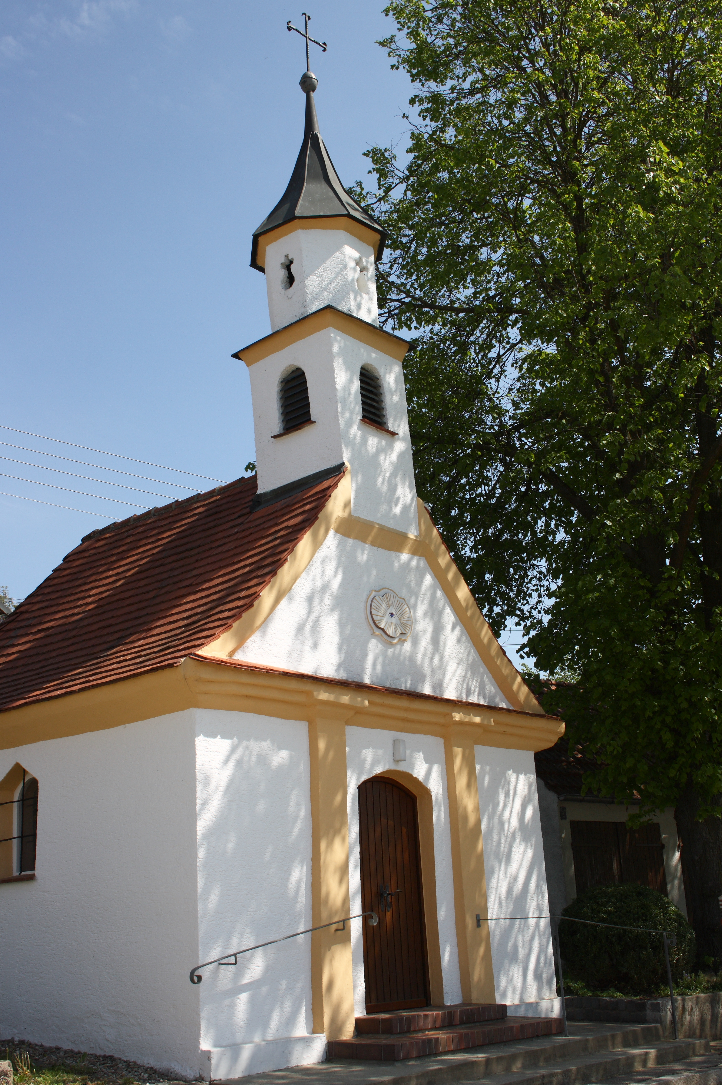 Marienkapelle in Possenried, einem Stadtteil von Wertingen im Landkreis Dillingen an der Donau (Bayern), Ansicht von Südwesten